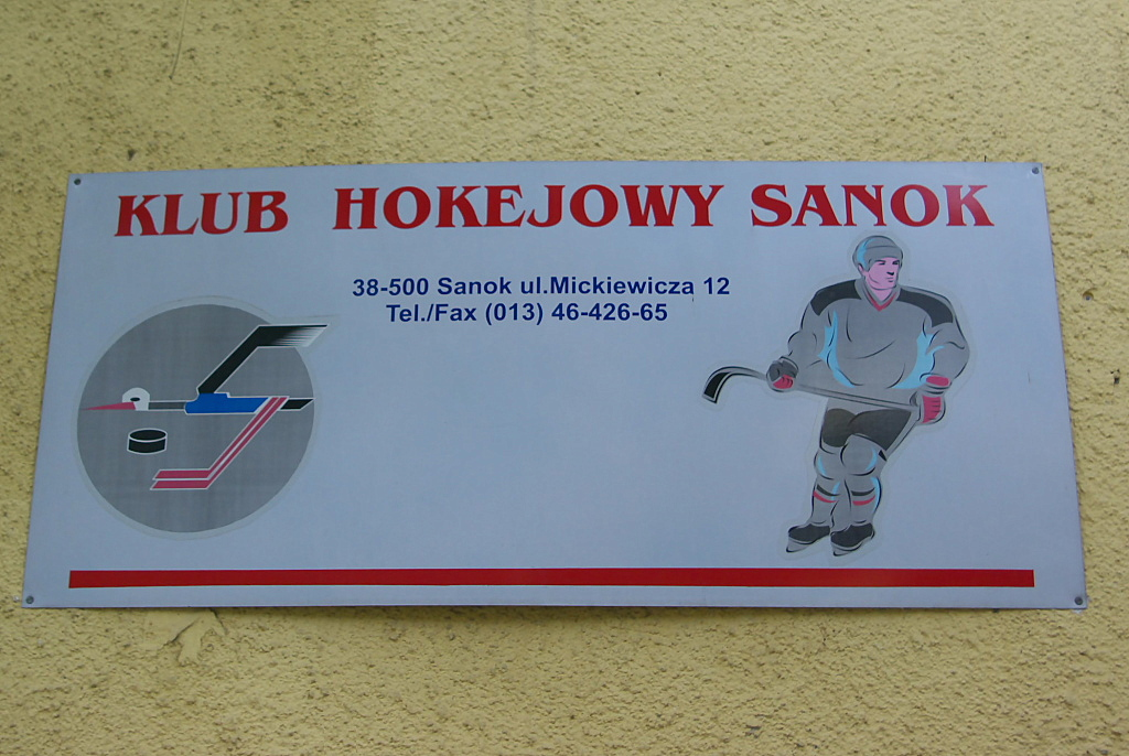 Tabliczka bylego klubu KH Sanok na budynku byej siedziby klubu przy ulicy Mickiewicza 12